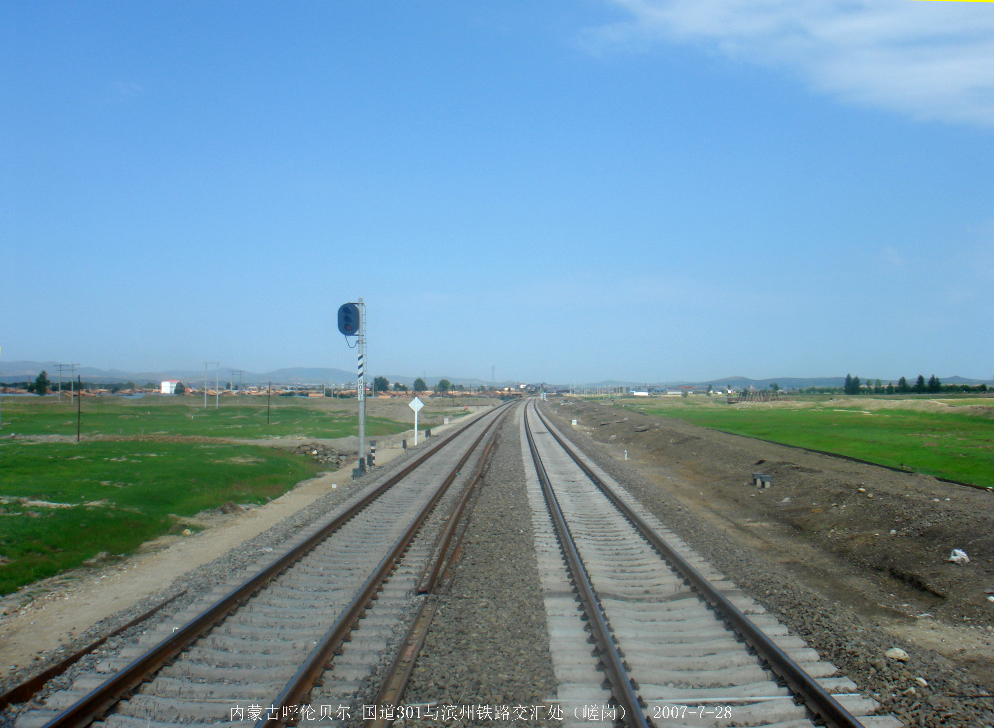 滨洲铁路 嵯岗（额尔敦乌拉嘎查）